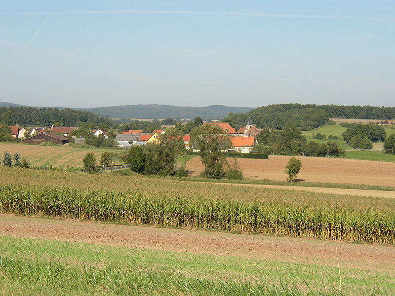 Stöckach i. UFR, Herbst 2006